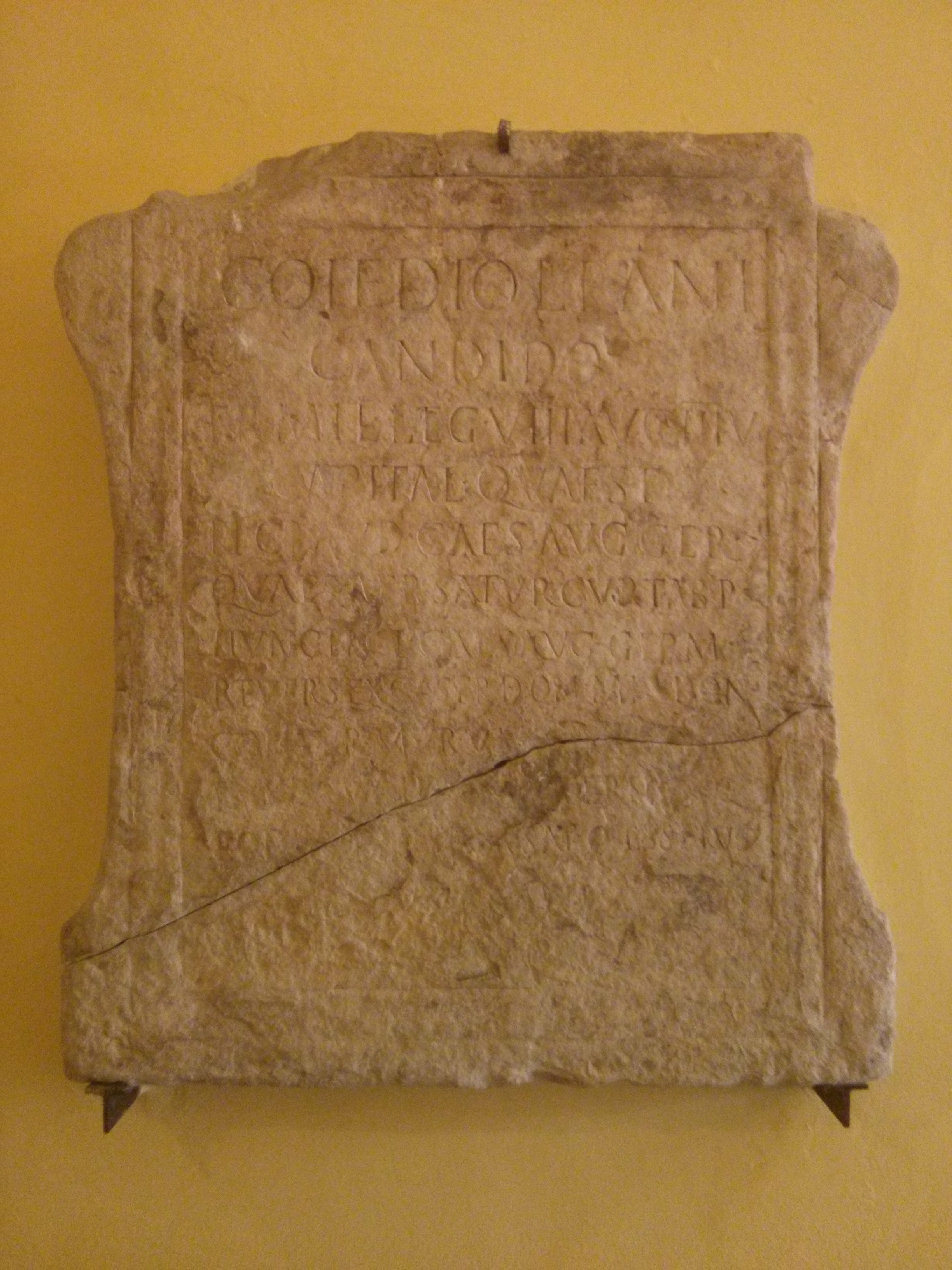 Iscrizione di Lucio Coiedio Candido, da Suasa, Museo archeologico della città romana di Suasa (CIL XI, 6163 = D 00967 = SupIt-18-S, pp. 339-341 = EDR 016323)